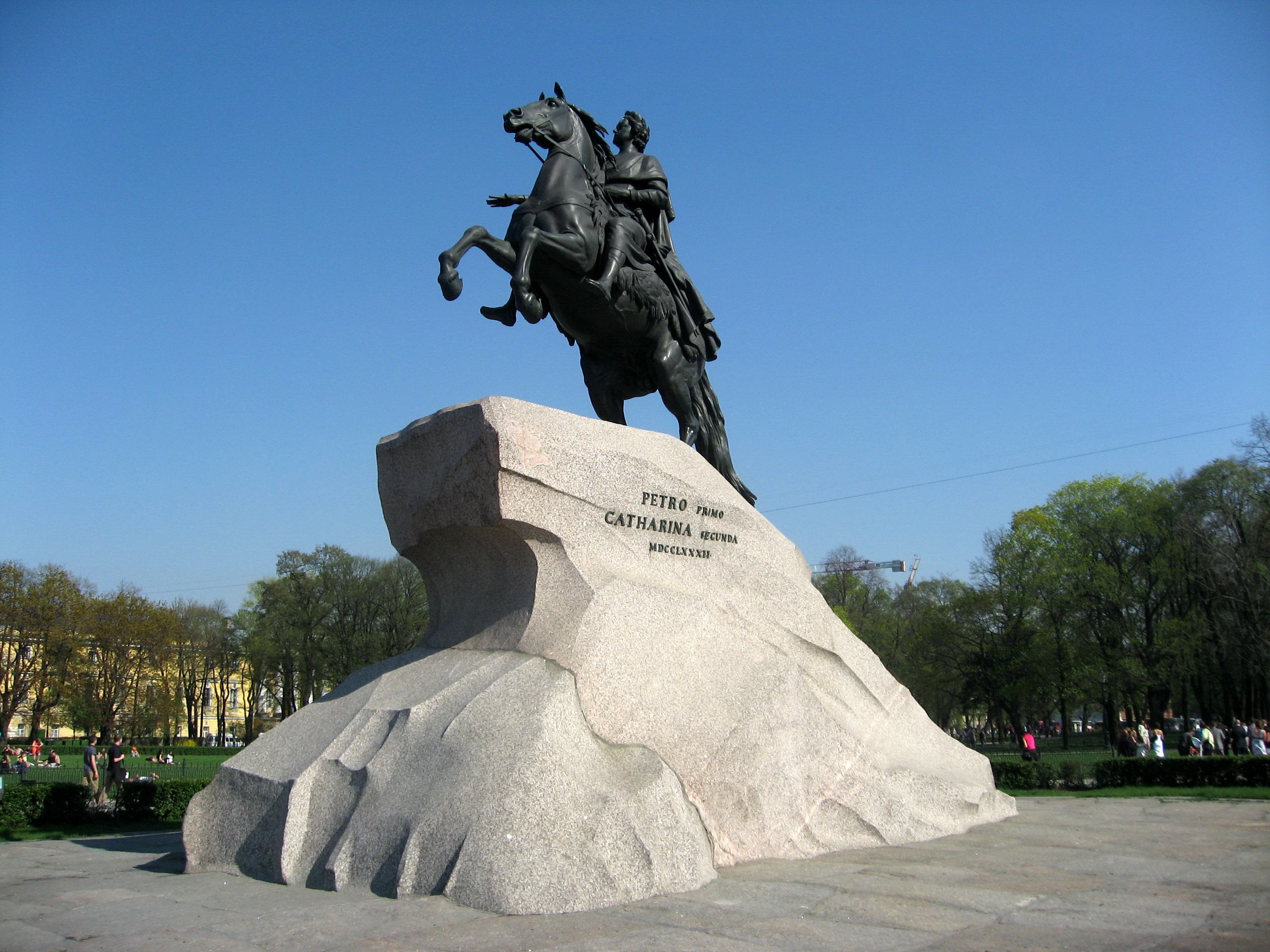 Bronzový jezdec, památník Petru Velikému